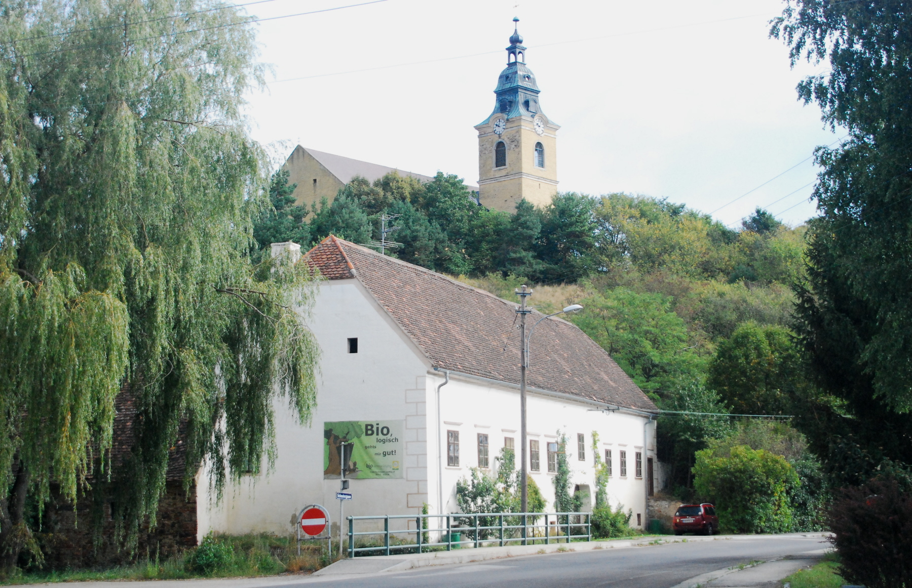 Sog. Bräuhaus, Weitersfeld